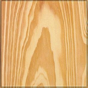 Foto da face tangencial da madeira de pinus (Pinus elliottii)